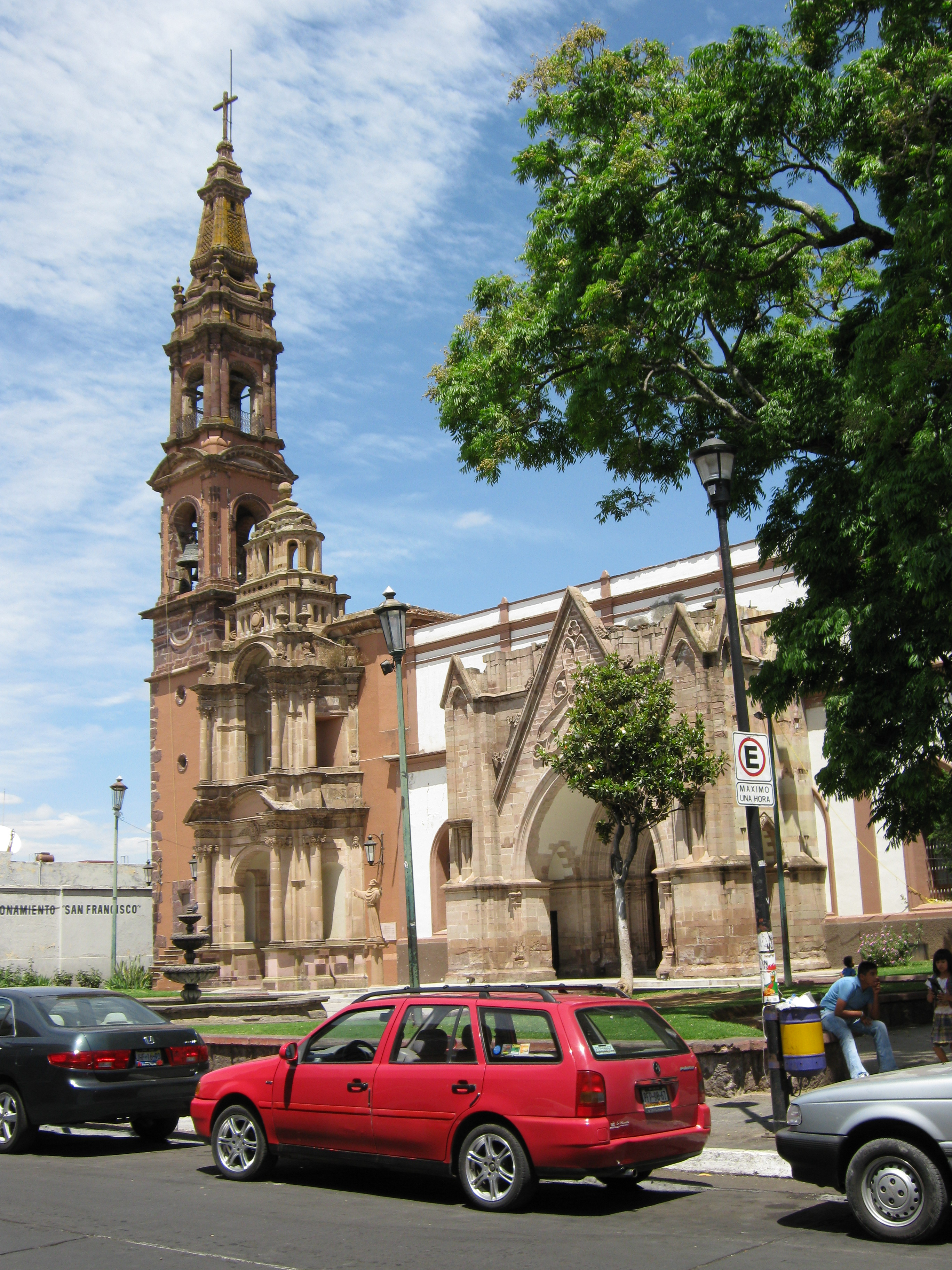 Izq: templo de San Francisco. Der: Capilla de Juan Diego